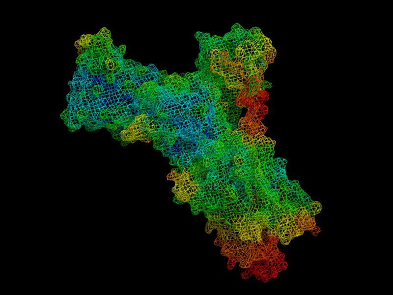 Struttura cristallina delle calcio ATPasi